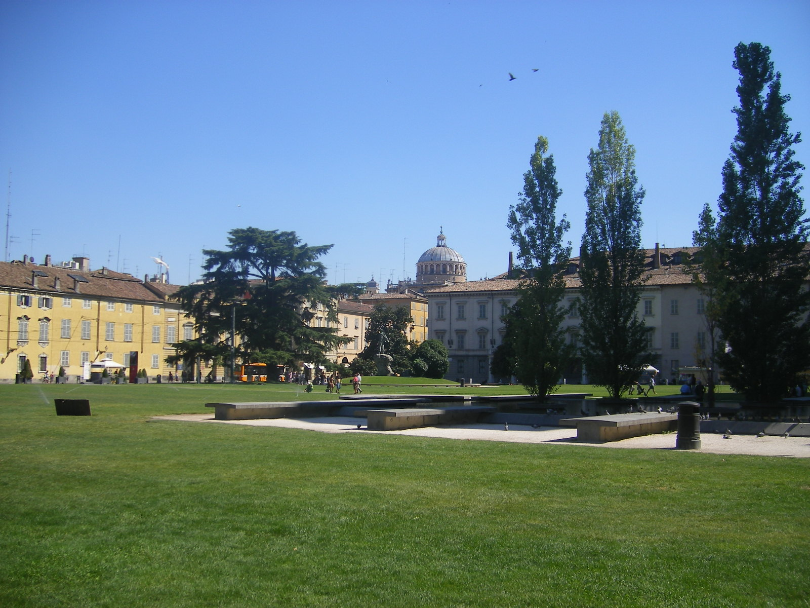 Parma - Piazza delle Pace